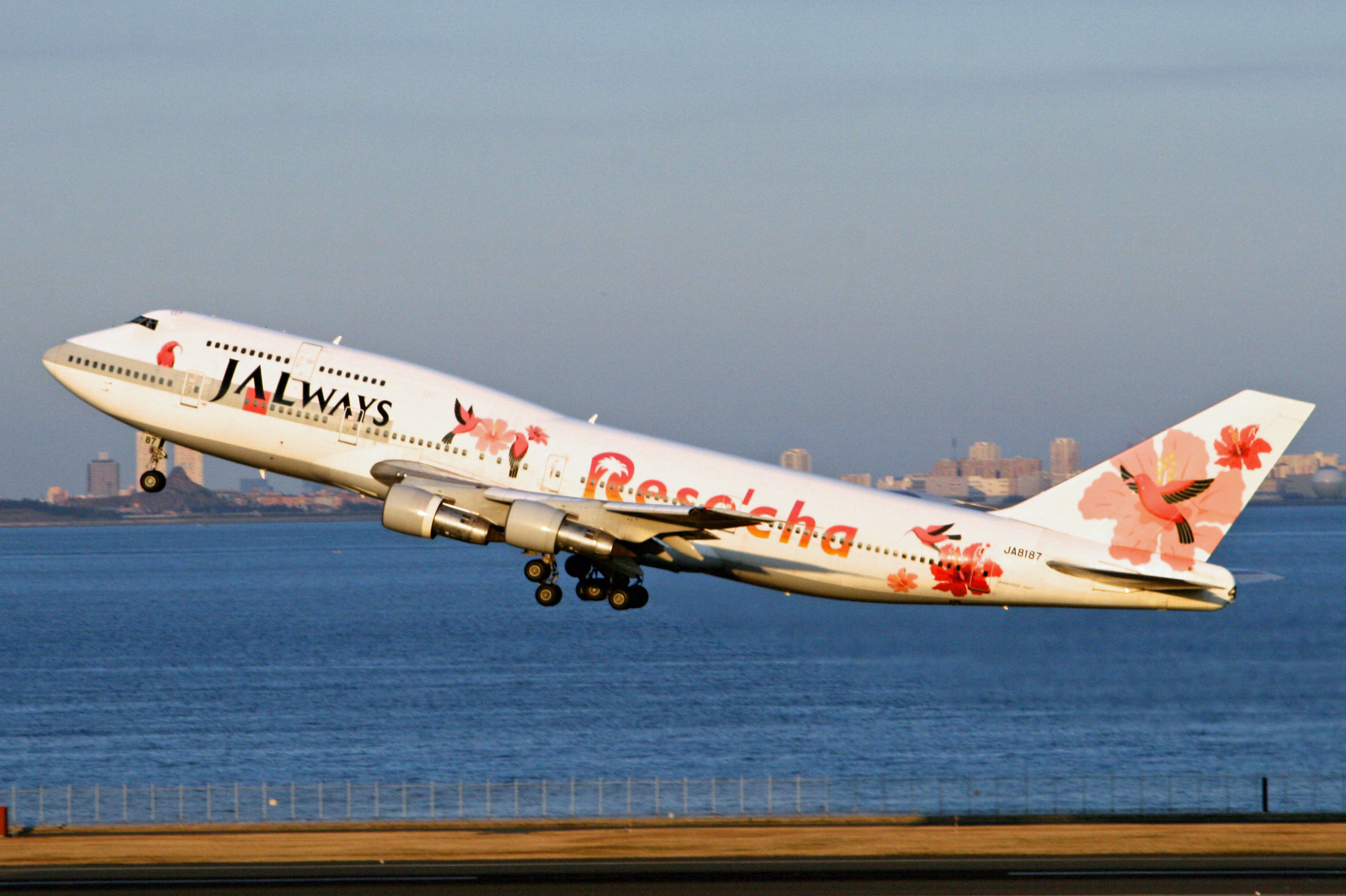 Boeing 747 JA8187(2007年1月14日、羽田空港にて) Boeing 747 JA8187(Taken on Jan. 14, 2007 at Haneda Airport).